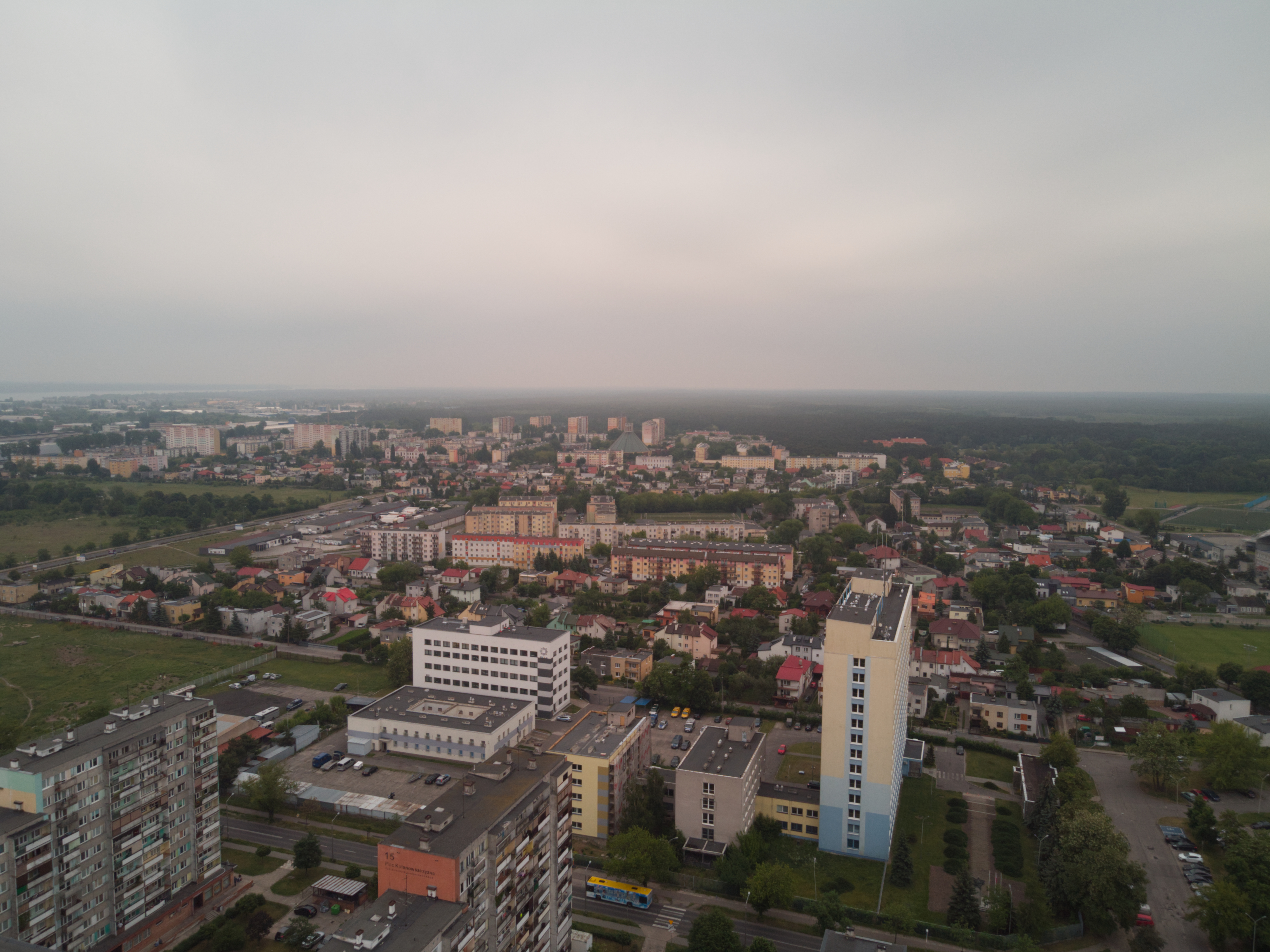 Styk Kazimierza Wielkiego i Śródmieścia (2020 r.)